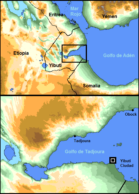 Mapa del Golfo de Tadjourah